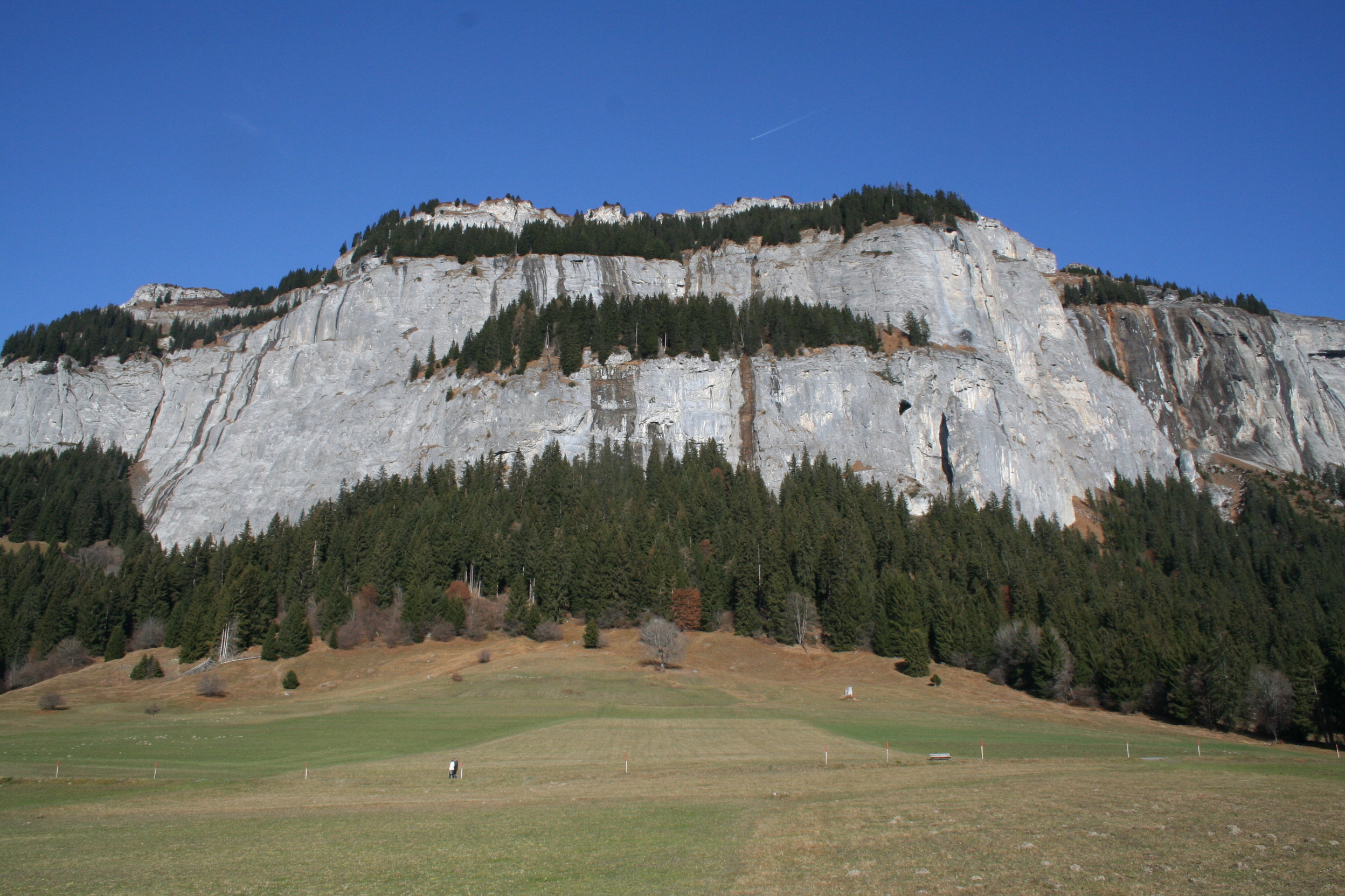 Flimserstein mit der Terrasse Pinut (unten)